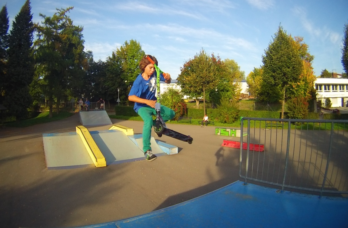 Stunt Scooter in Halfpipe Skatepark Fischbach am Bodensee